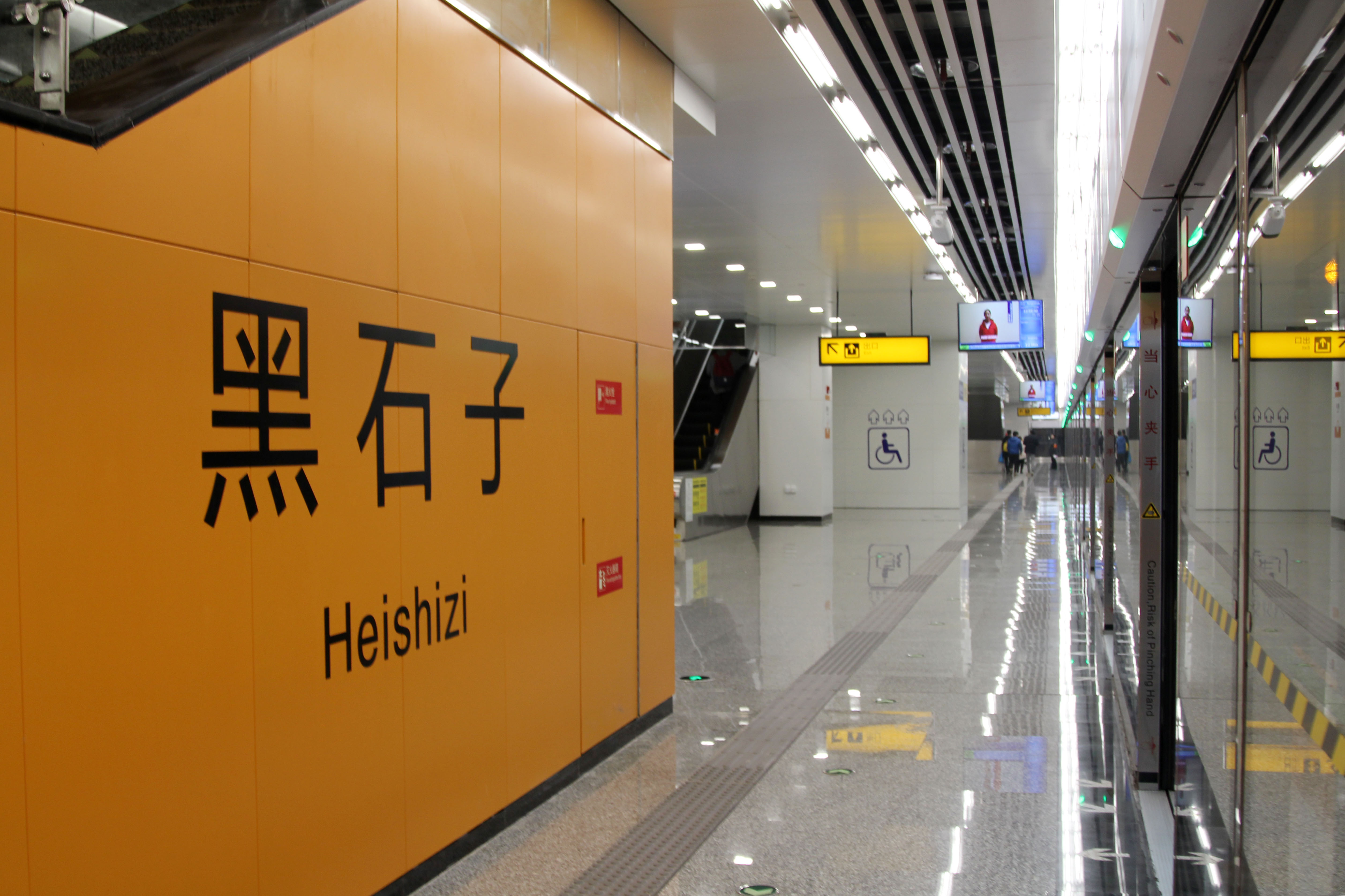 中文（中国大陆）: 4号线黑石子站